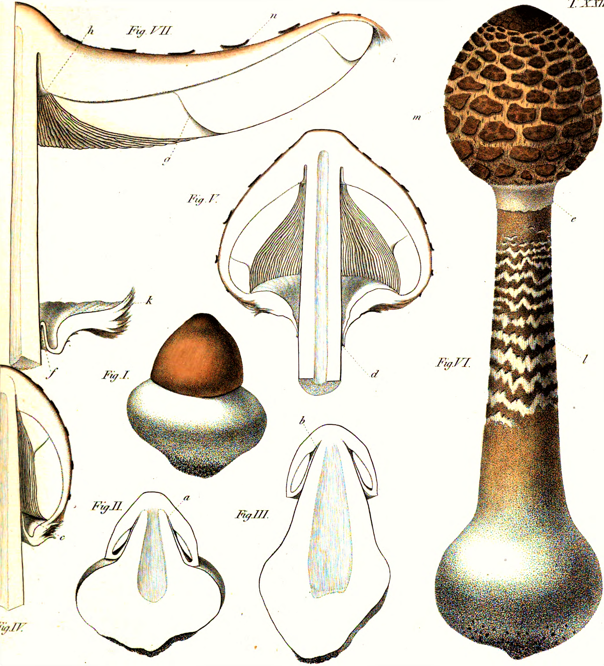 Carlo Vittadini: Agaricus procerus (1835)